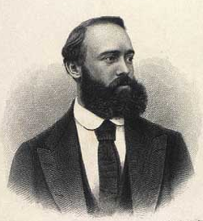 Fødtes i Danmark, voksede op i Belgien og virkede i Weimar (Tyskland) fra 1858 til sin død Born in Denmark, raised in Belgium and worked in Weimar (Germany) from 1858